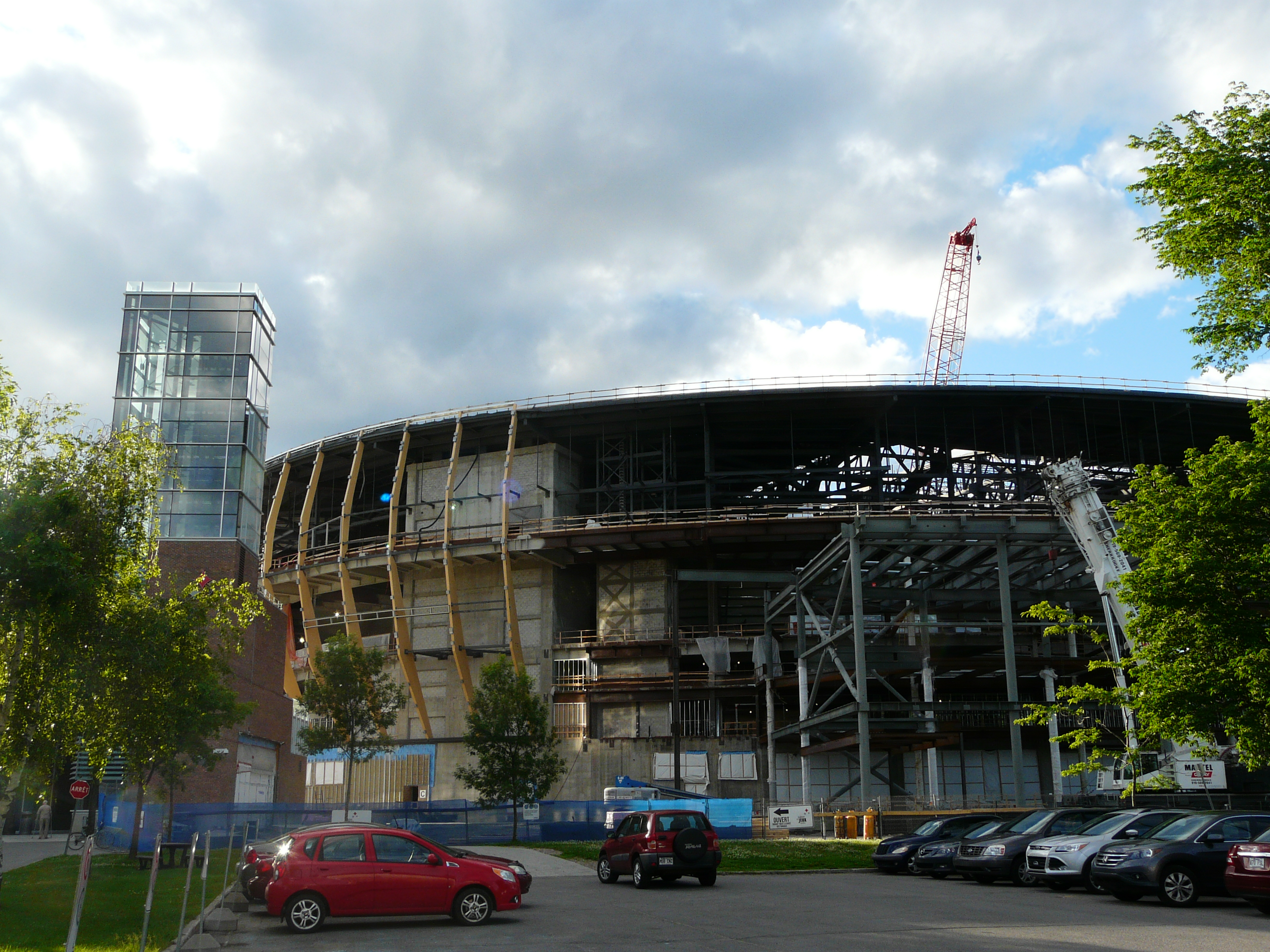 Façade de l'Amphithéâtre de Québec, en construction